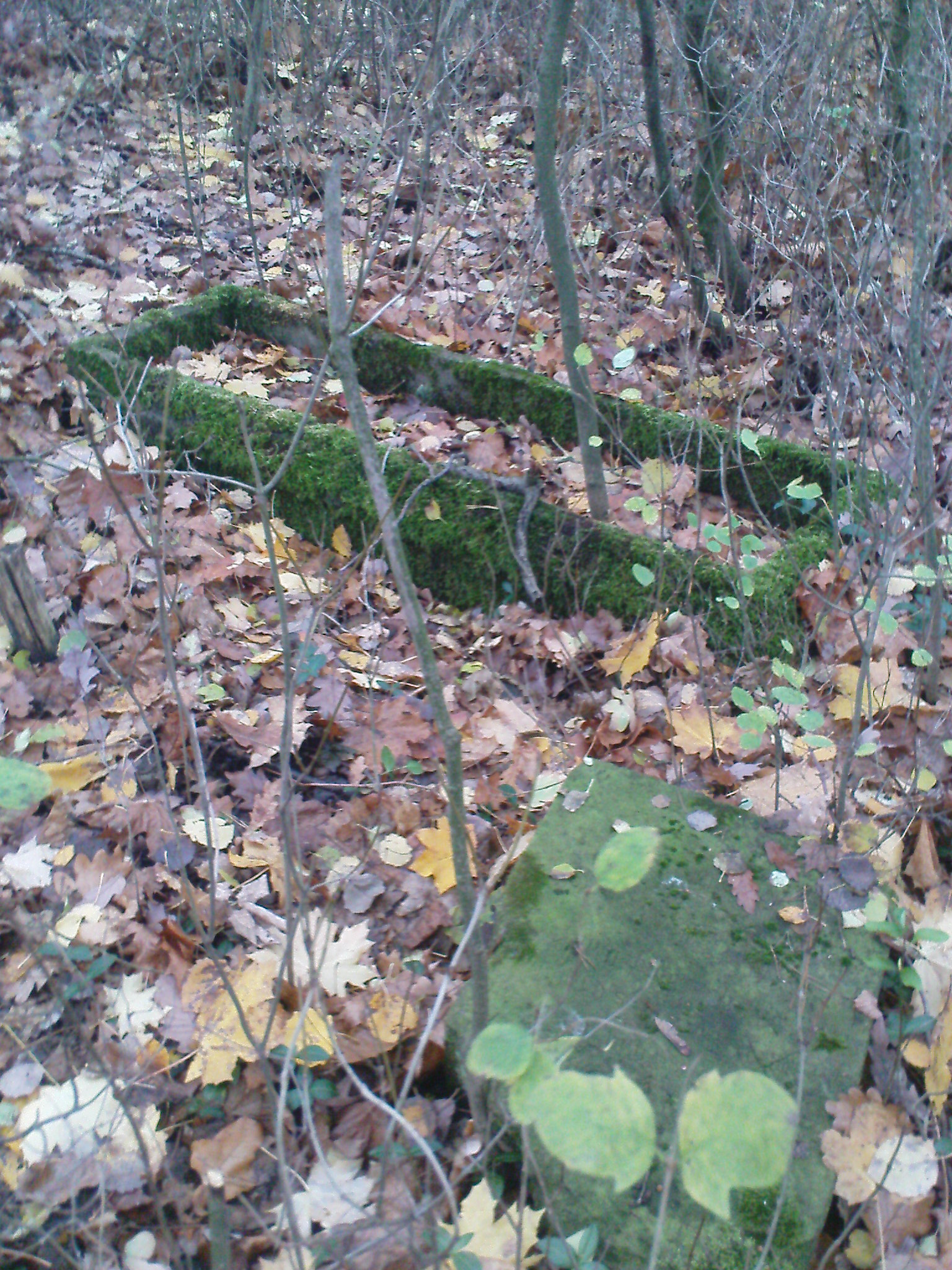 Zaniedbane groby na cmentarzu ewangelickim w Dąbrowie